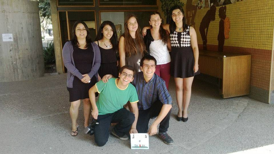 Equipo de Recrea 2014